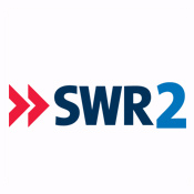 SWR2 Logo bis 2014